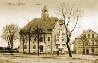 Witnica - ratusz (pocztówka z XIX wieku)